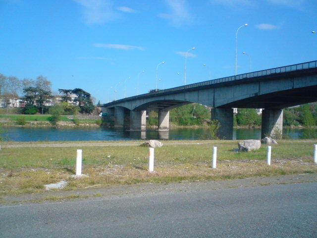 Pont de Pierre entre Agen et Le Passage d'Agen